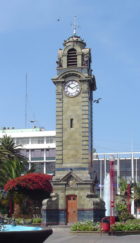 Torre Reloj ubicada en la Plaza Colón. Torre Reloj de Antofagasta. Réplica de menor tamaño del Great Clock of Westminster (conocido coloquialmente como Big Ben). Posee el mismo sistema de relojería y campanas, pero una estructura externa que difiere del original. Antofagasta, Chile. Source: [1] Date: 19/11/2005 Author: Marcos Escalier